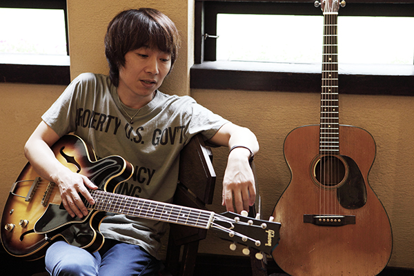 宮田和弥（みやた かずや）